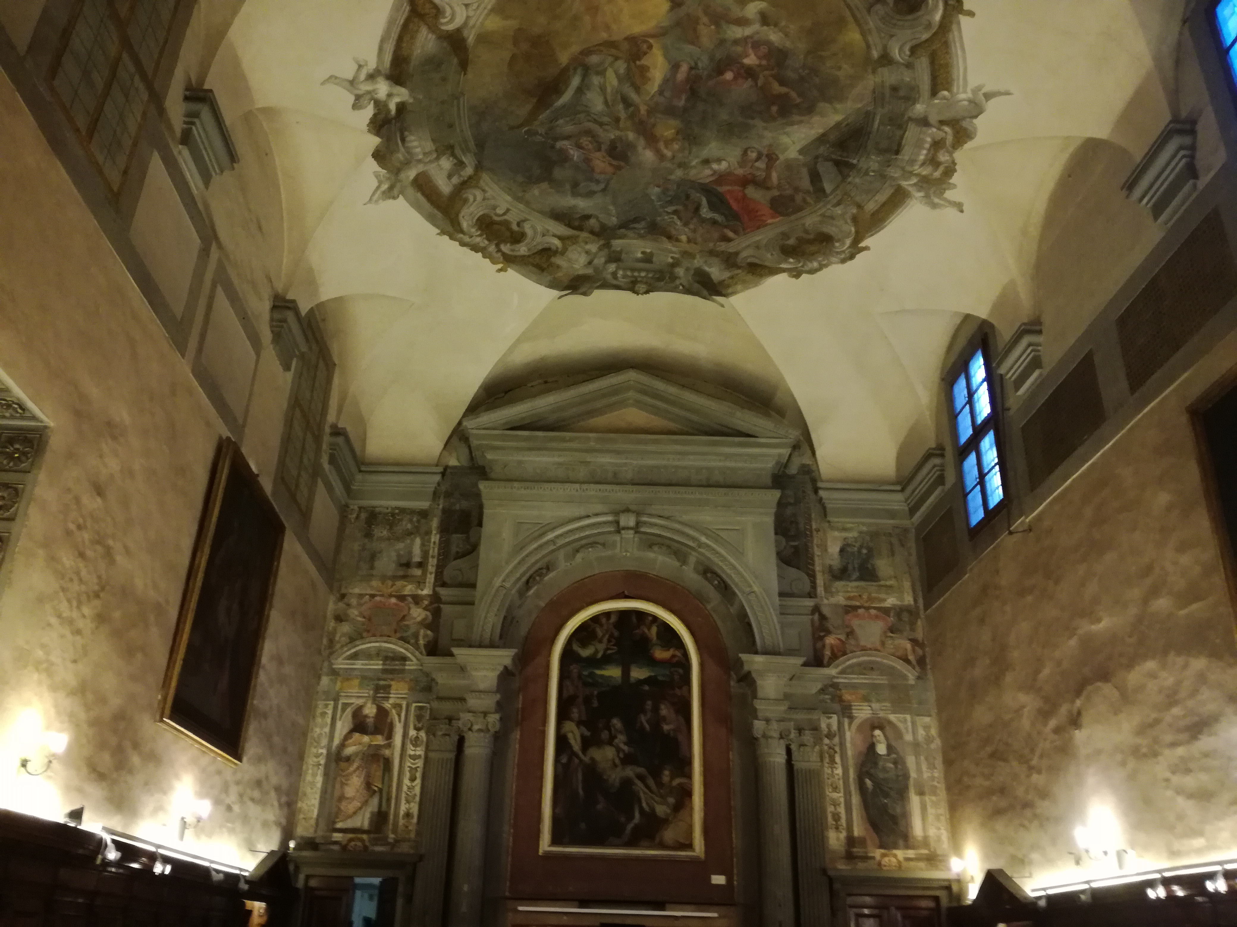 Interno della chiesa di Santa Monica